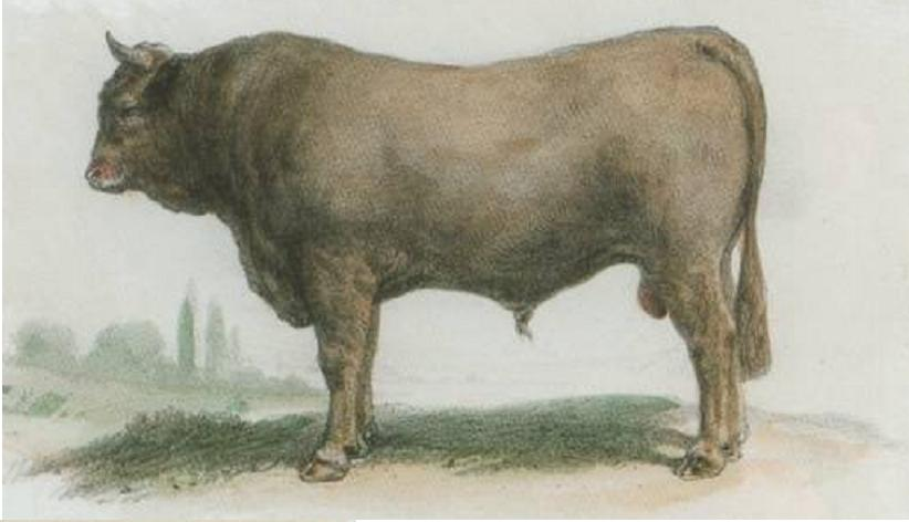 gravure représentant un "Taureau de race limousine âgé de 24 mois" lors d'un concours d'animaux reproducteurs, d'instruments et de produits agricoles en 18533. Ce pourrait être la première représentation en couleur de la race limousine présentée en tant que telle.